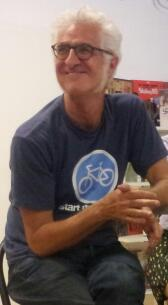 A València.